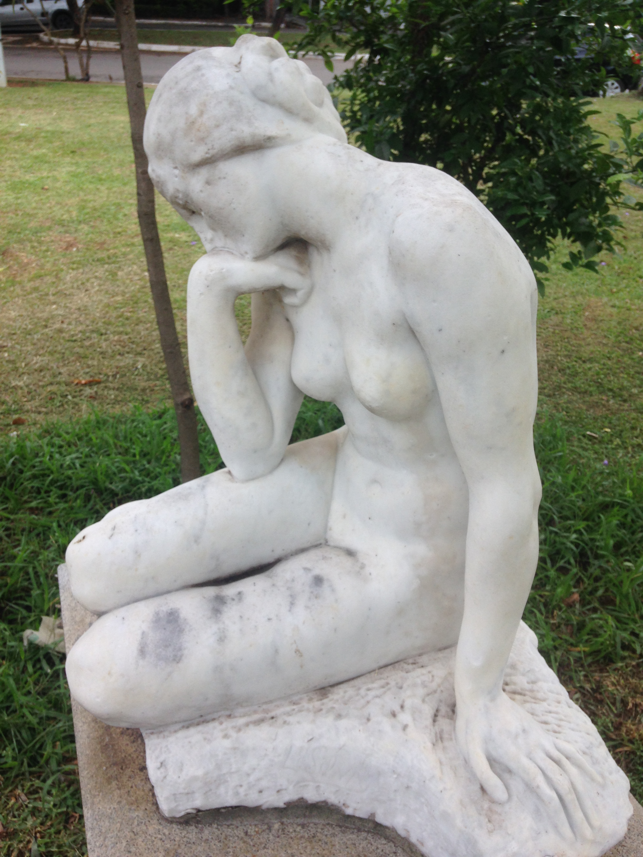 Nostalgia, por Francisco Leopoldo e Silva (escultura de mármore, granito e bronze, 1975). A obra “Nostalgia”, é uma estátua esculpida em mármore, com uma base de granito e uma placa feita em bronze. Apesar de ser uma cópia da original, a escultura está localizada na Praça Professor Cardim, na cidade de São Paulo, em frente ao Jockey Clube. Antes a estátua ficava localizada no Parque Trianon, fazendo par com a obra “Aretuza”. A Praça Professor Cardim, como consta em uma placa, é conservada pela Antena 1. A obra já está desgastada, suja e em alguns pontos acumula água. Foto tirada de um dos lados da obra para mostrar a angulação do corpo e do rosto.